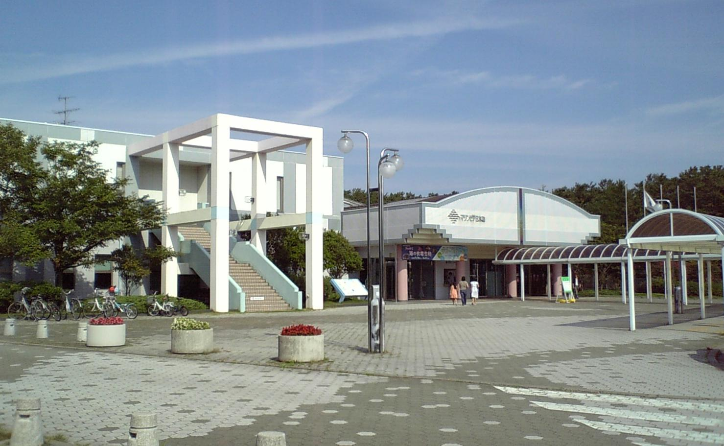 新潟市水族館(マリンピア日本海)